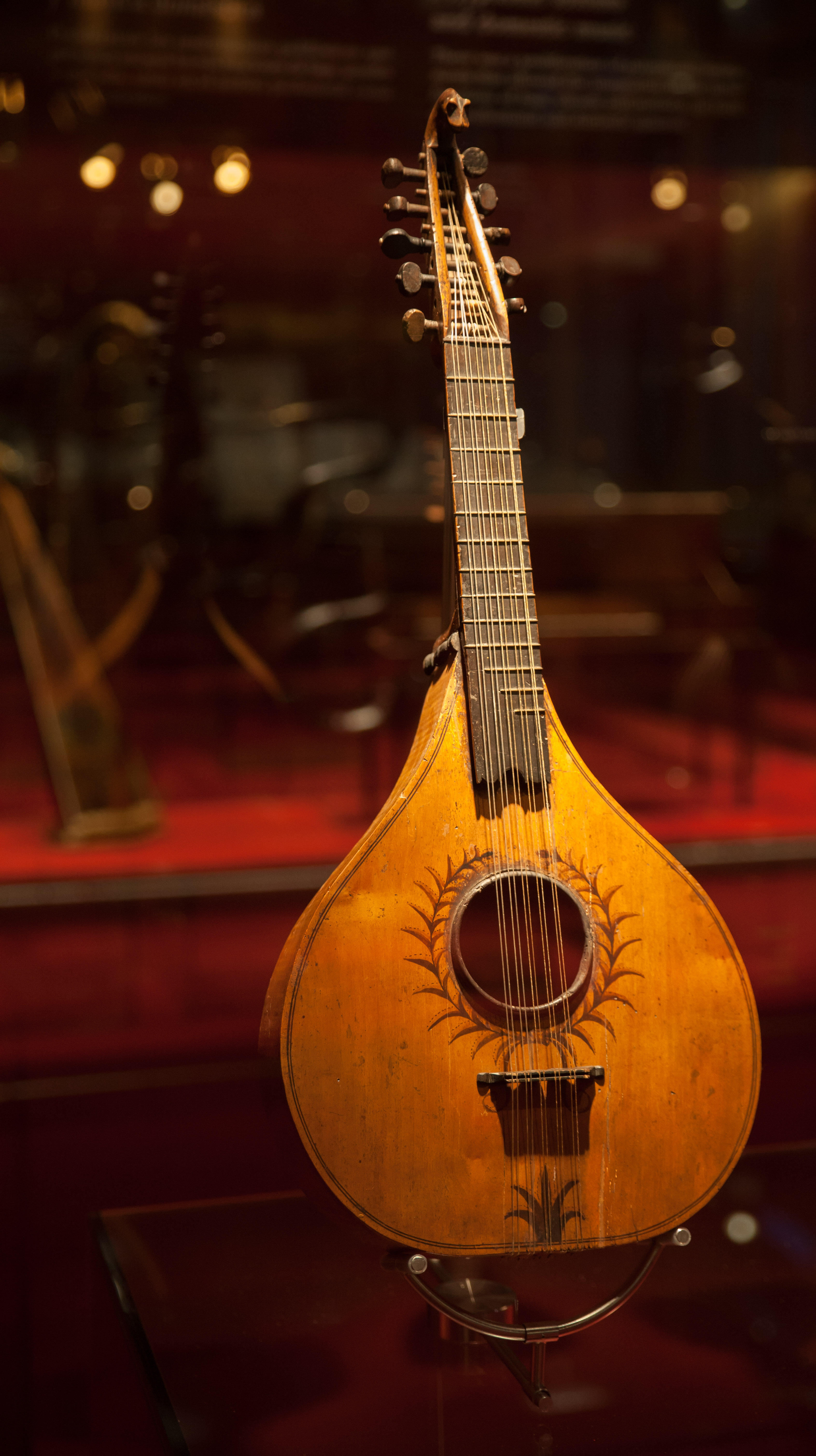 Cistre, s. XVI, MDMB 331, al Museu de la Música de Barcelona